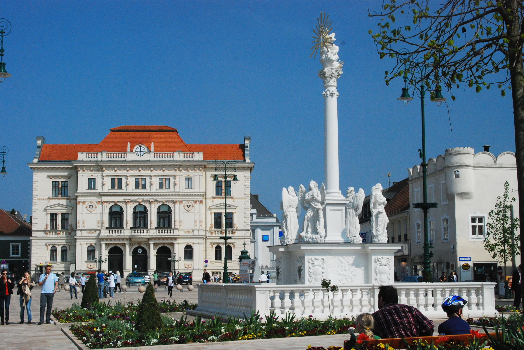 Hauptplatz von Tulln an der Donau in Niederösterreich, mit Bezirkshauptmannschaft und Pest/Dreifaltigkeitssäule